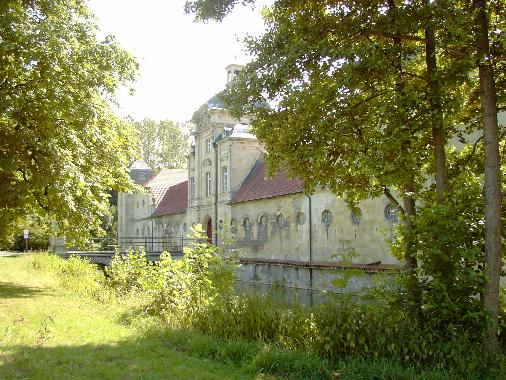 Haus Stapel bei Havixbeck